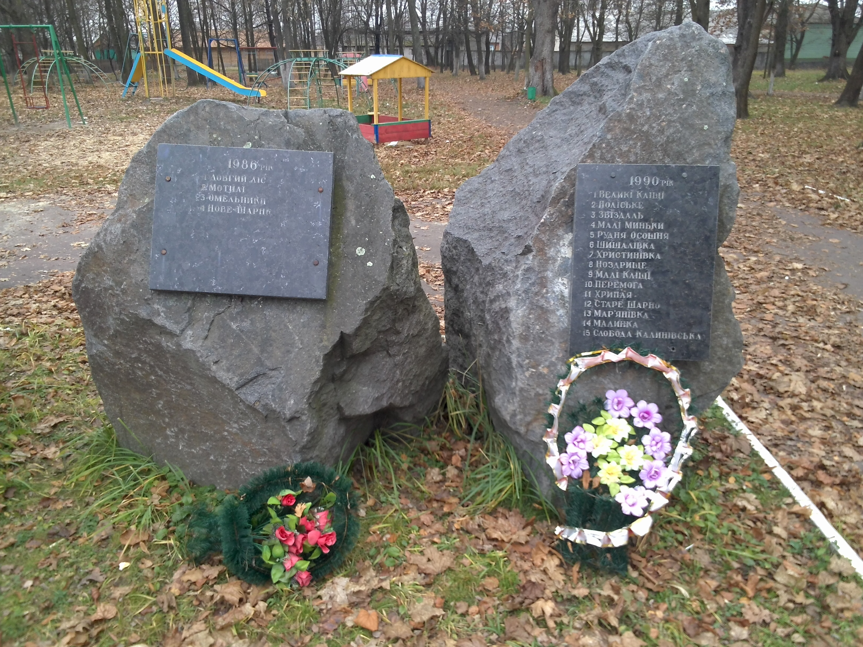 смт Народичи